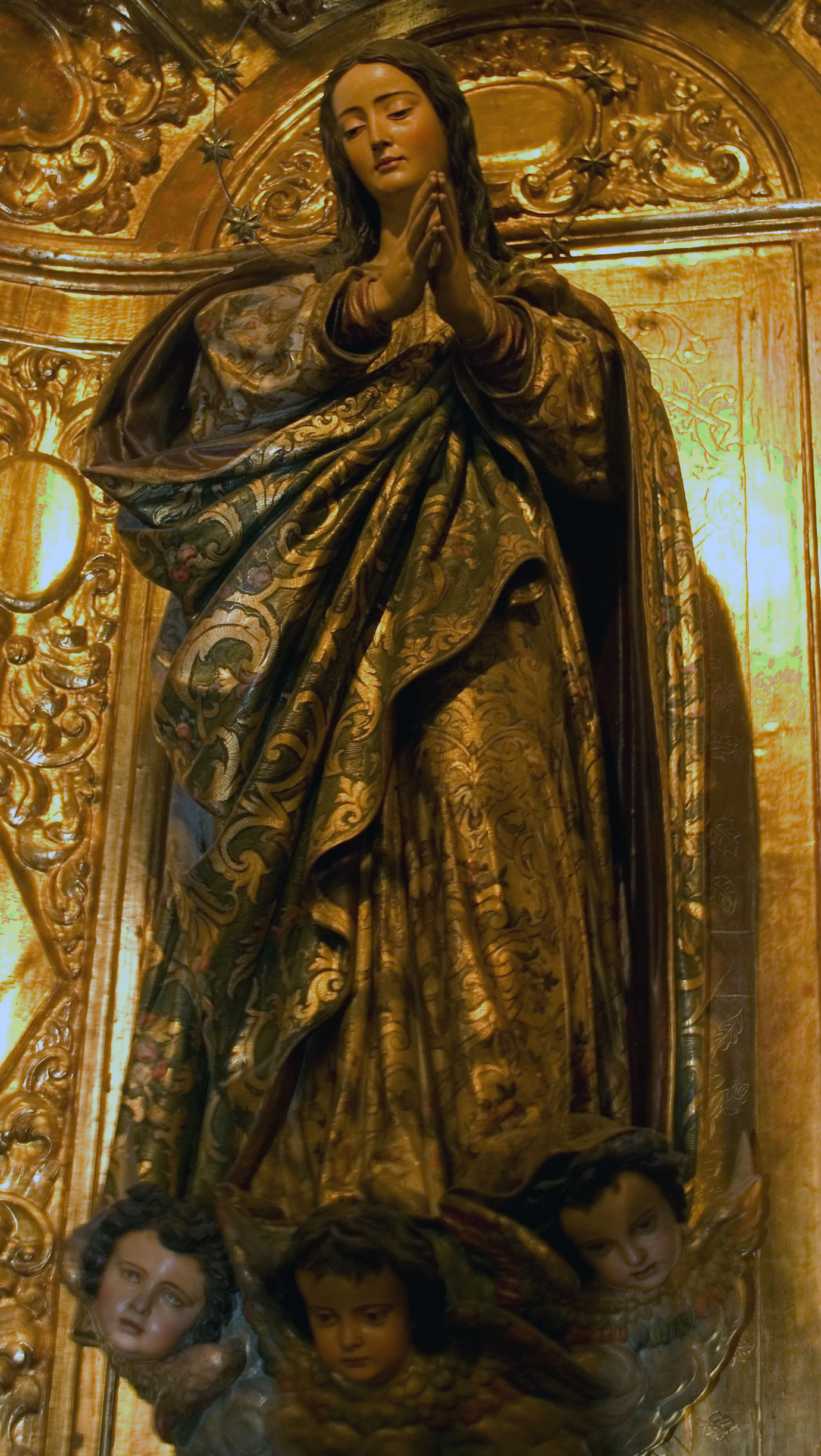 Inmaculada, (La Cieguecita) (1629-1631), autor: Juan Martínez Montañés, Catedral de Sevilla